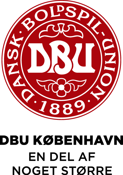 Logo